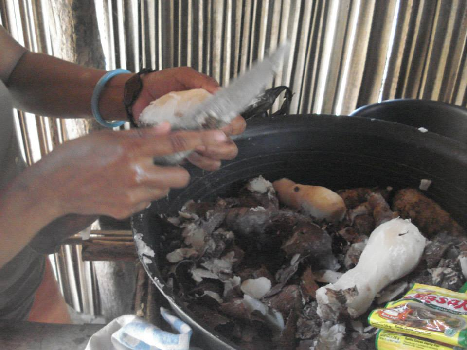 Fatuberlio, Manufahi